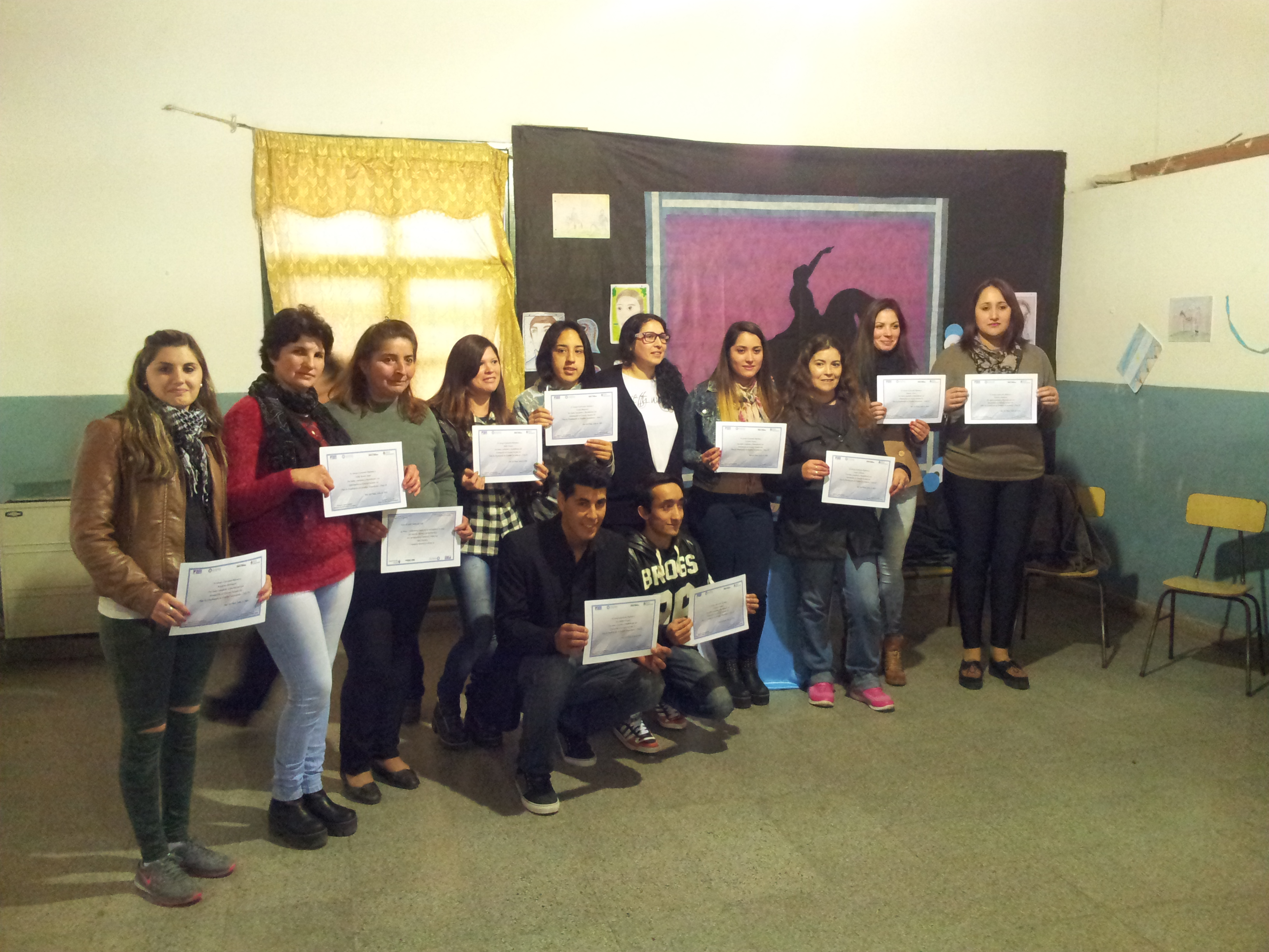 promocion 2016 graduados Plan FINES en la Ciudad de Mar del PLata. Comision 215